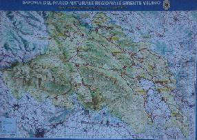 La mappa della parco Sirente-Velino e valle Subequana con gli itinerari dell'ippovia evidenziati in rosso